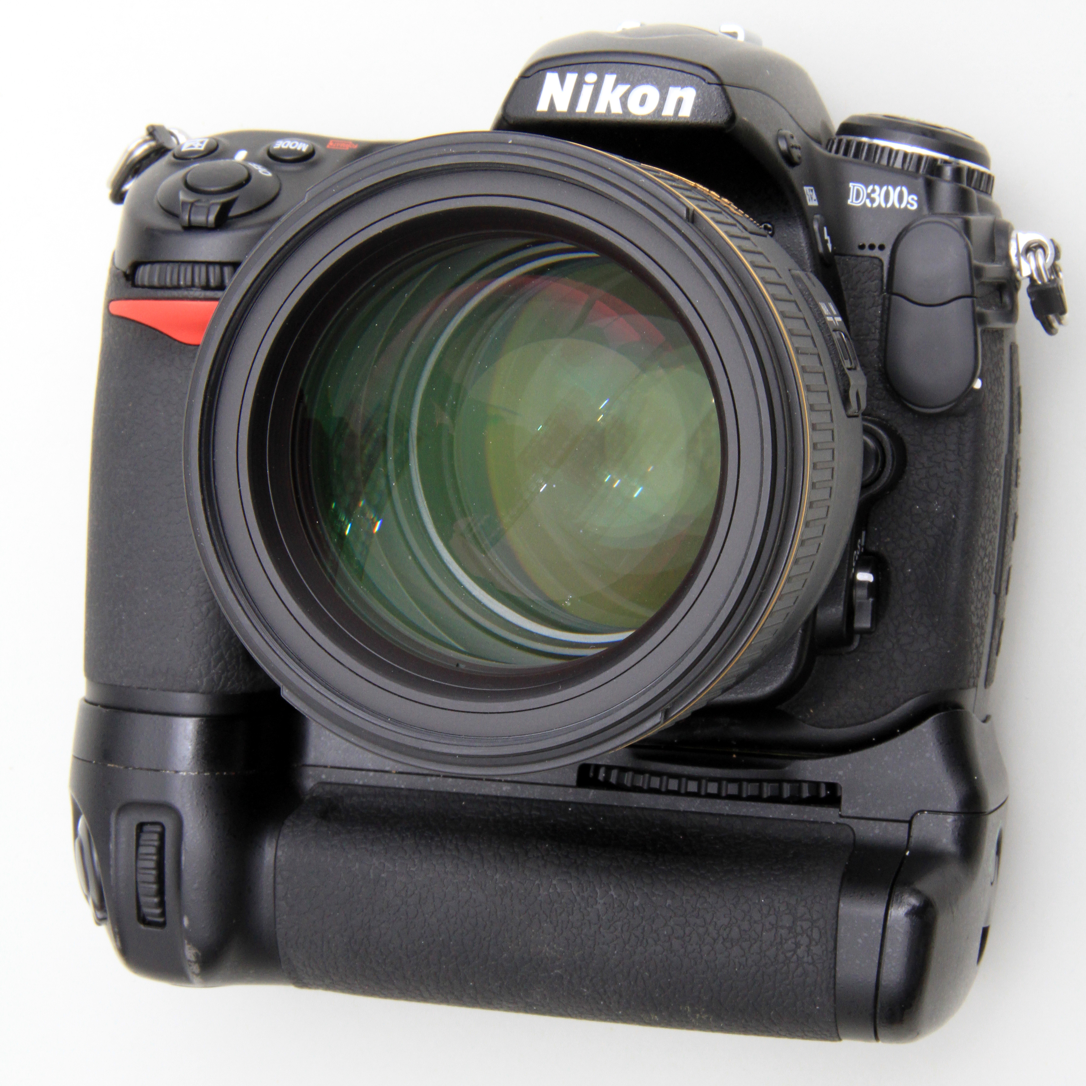 Nikkor 1,4/85)